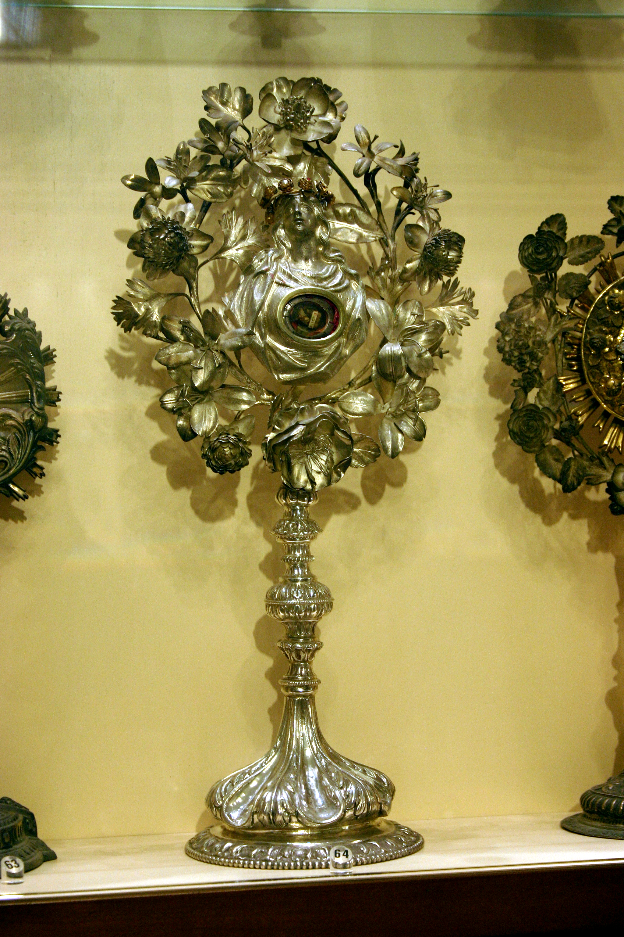 Cathedral of Palermo